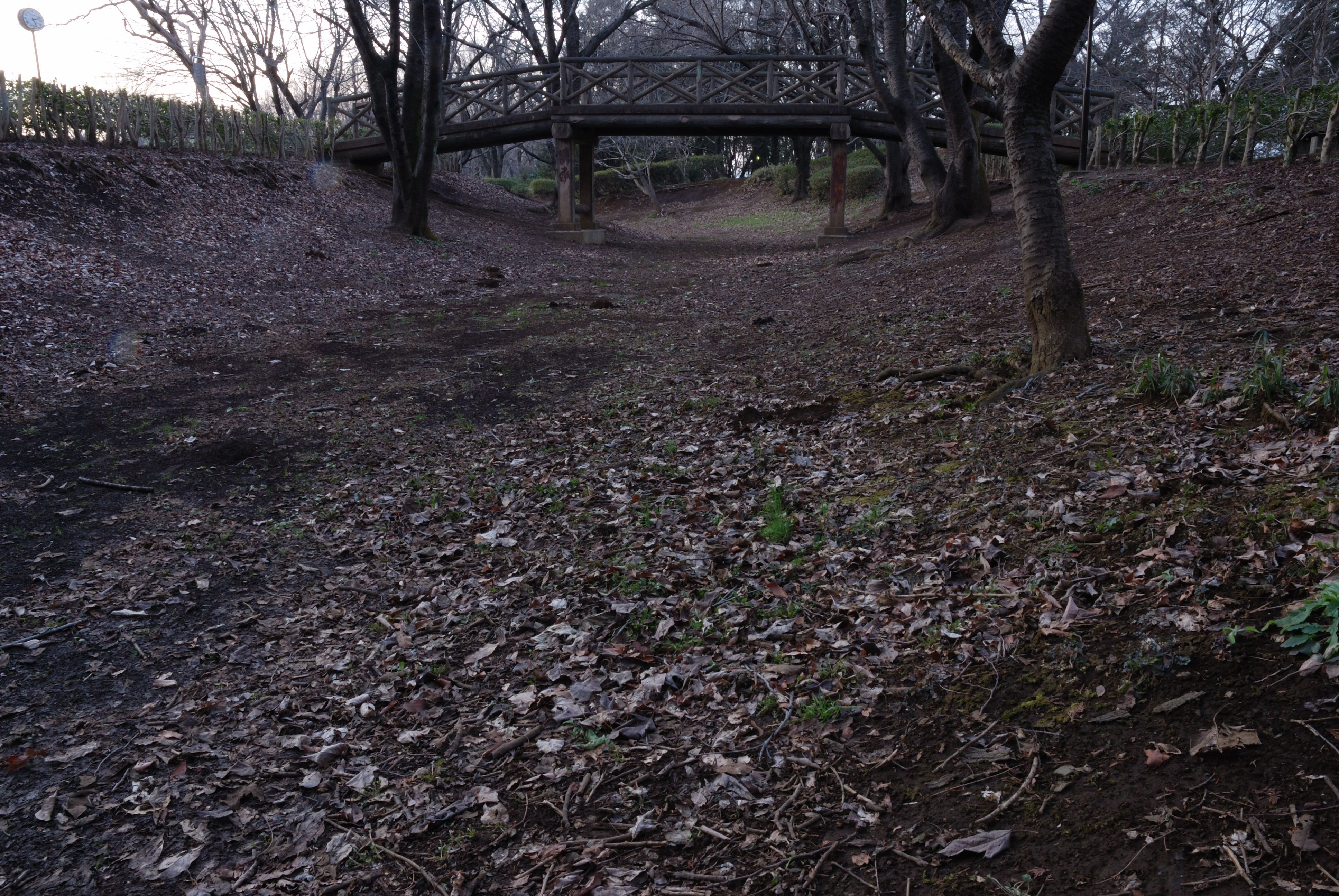 Katakura castle karabori